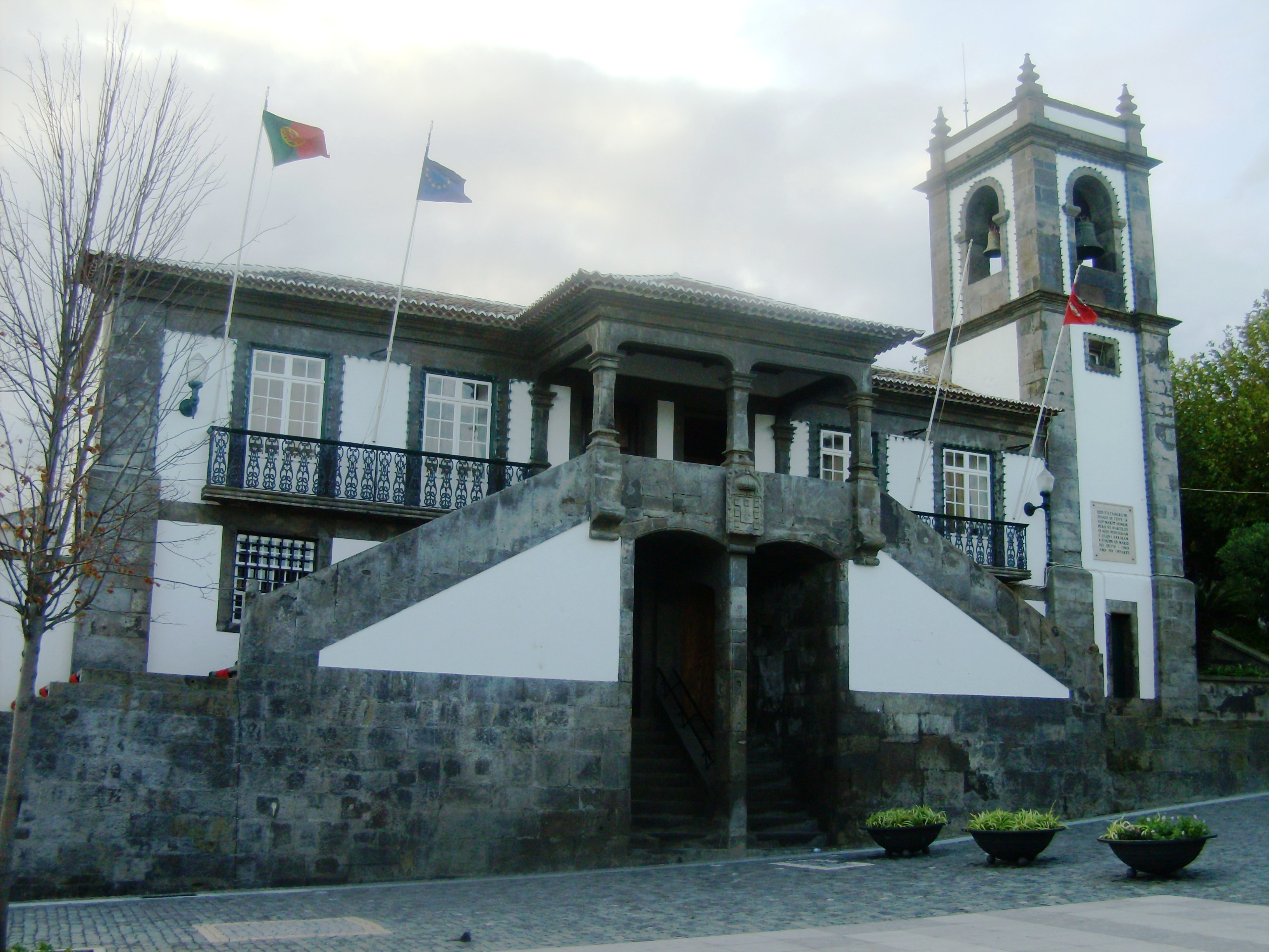 Edifício da Câmara Municipal, Praia da Vitória, ilha Terceira, Açores.